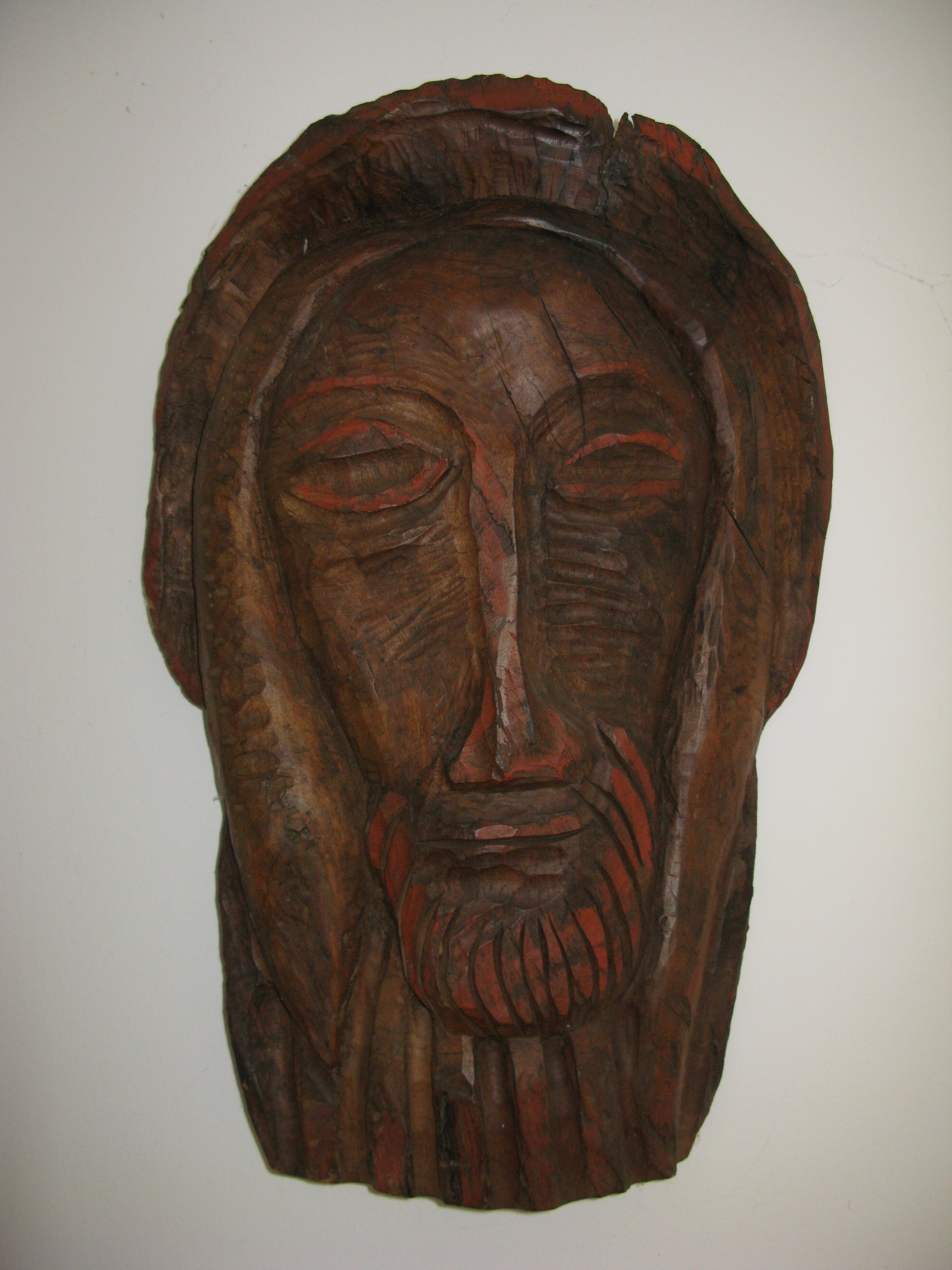 Visage du Christ, bois d'olivier taillé environ 1954, succession Jean Vincent de Crozals